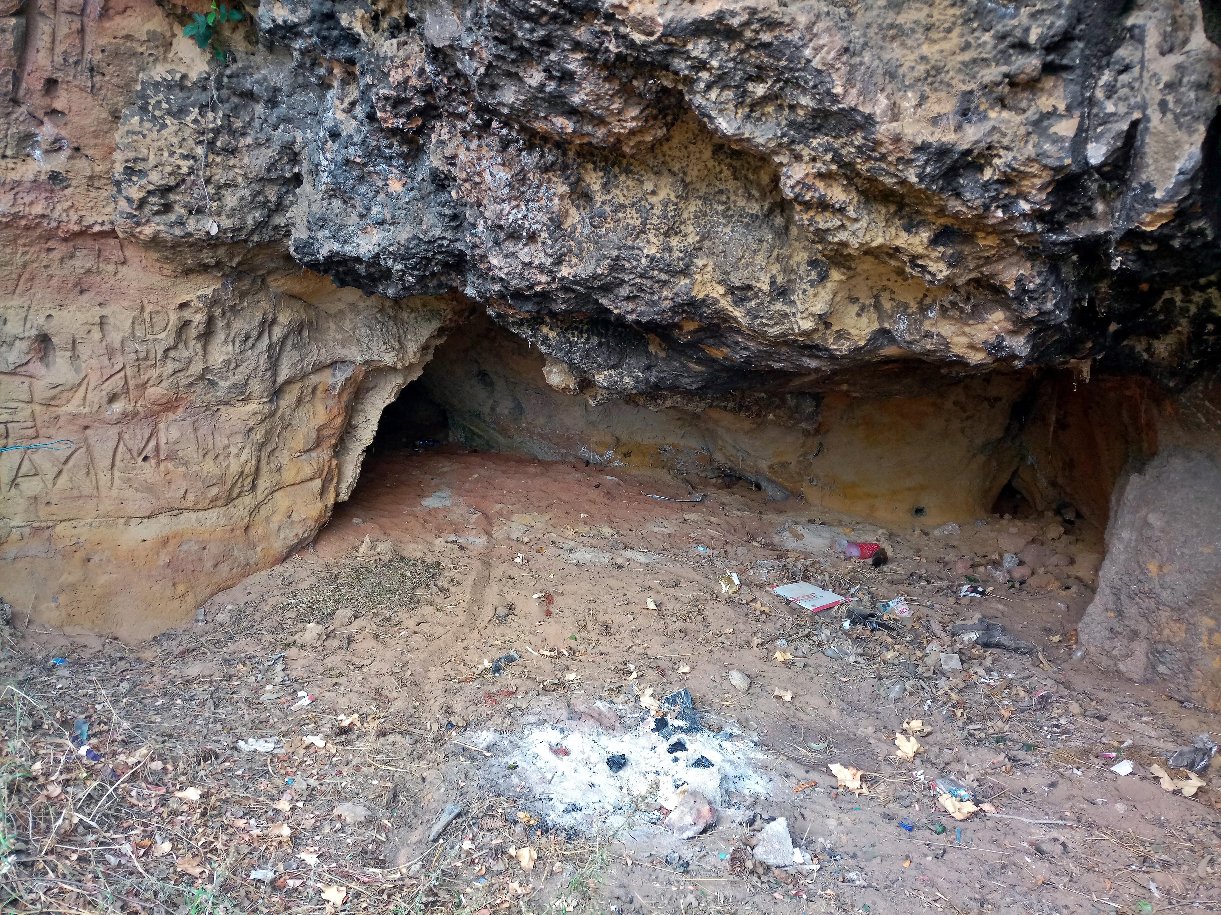 Sausenheim Fuchshöhle